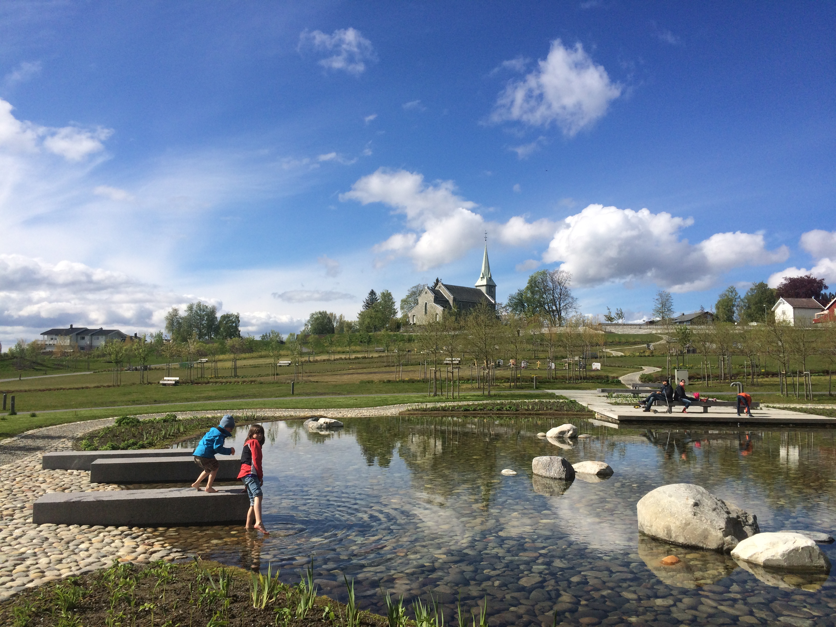 Anlegget er planlagt av arkitektkontoret Agraff AS; Norconsult AS og Kirkelig fellesråd i Trondheim, og vant Trondheim kommunes byggeskikkpris 2015